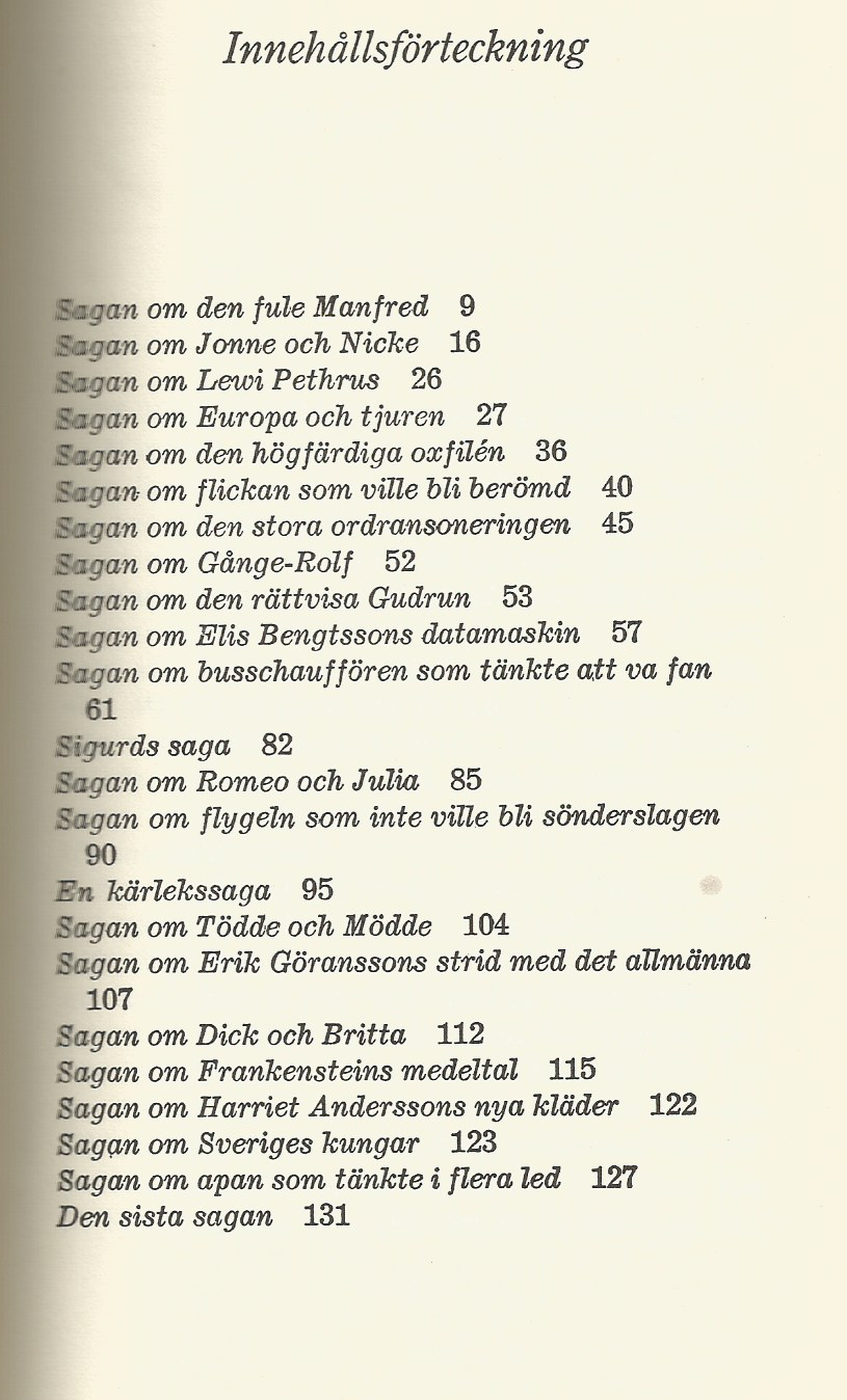 Skannad innehållsförteckning från min bok, utgåva från Hallandspostens boktryckri AB 1971